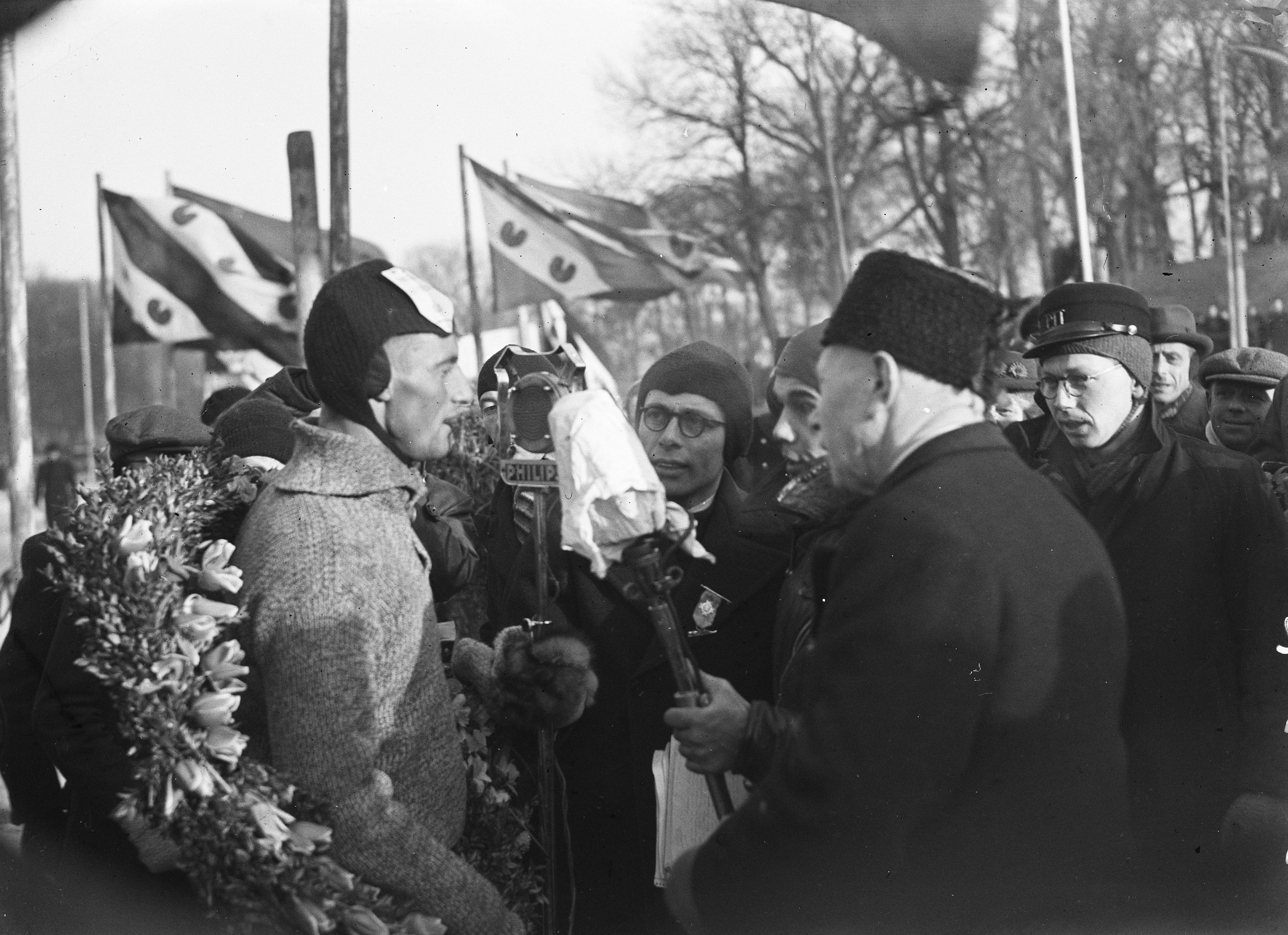 Collectie / Archief : Fotocollectie Anefo Reportage / Serie : [ onbekend ] Beschrijving : Joop Bosman uit Breukelen wordt gehuldigd als winnaar van de Elfstedentocht Datum : 8 februari 1947 Locatie : Friesland, Leeuwarden Trefwoorden : schaatsen, sport Persoonsnaam : Bosman Joop Instellingsnaam : Elfstedentocht Fotograaf : Sagers, Harry / Anefo Auteursrechthebbende : Nationaal Archief Materiaalsoort : Glasnegatief Nummer archiefinventaris : bekijk toegang 2.24.01.09 Bestanddeelnummer : 902-0330